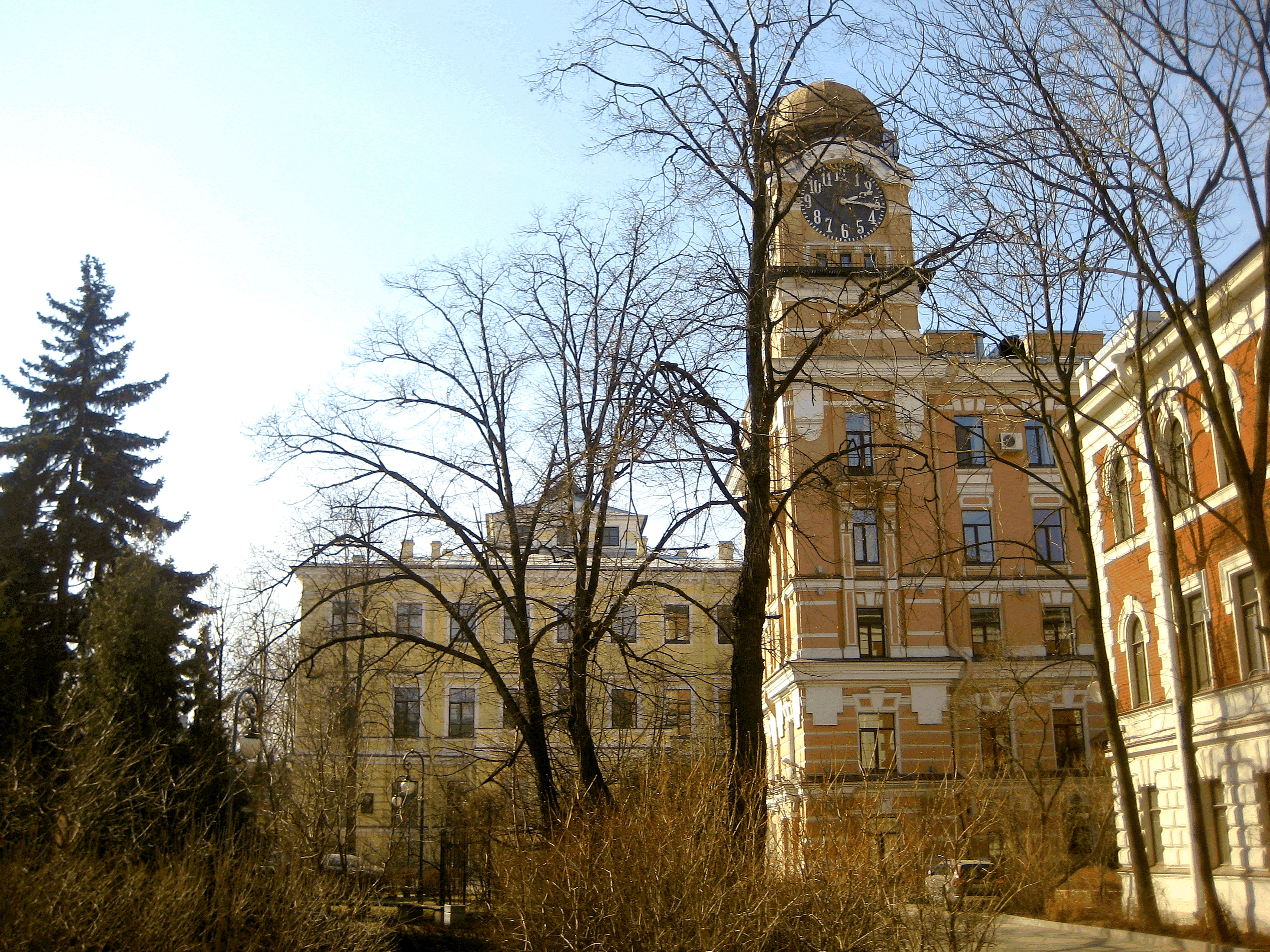 Санкт-Петербург. Московский проспект, 19. Палата мер и весов. Часовой корпус с башней. Архитектор - Козлов С.С.